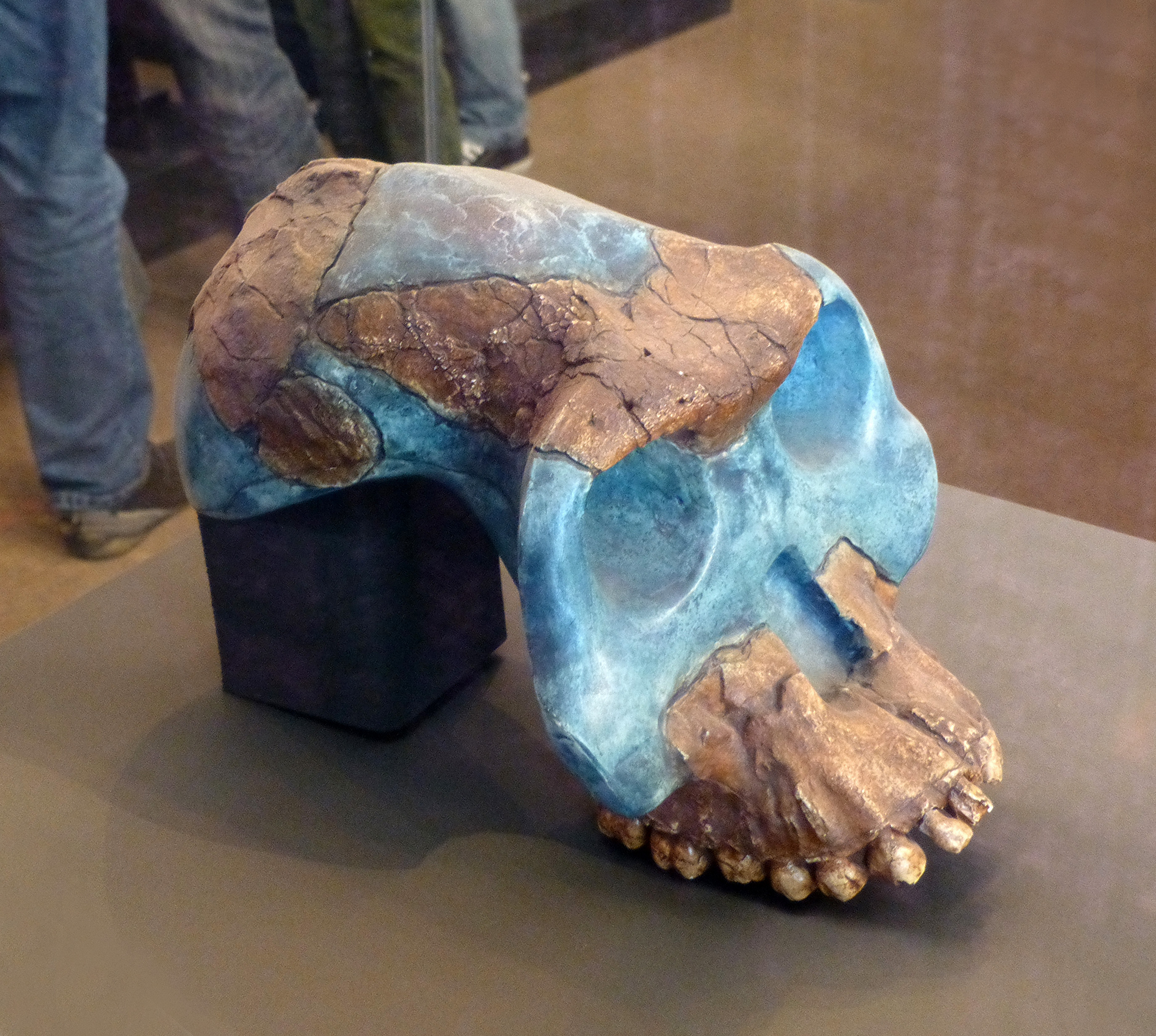 Addis Abeba, Musée national d'Ethiopie : crâne reconstitué d'Australopithecus garhi à partir d'éléments trouvés en 1997 (Awash, région Afar). 2,5 millions d'années. BOU-VP 12/130.